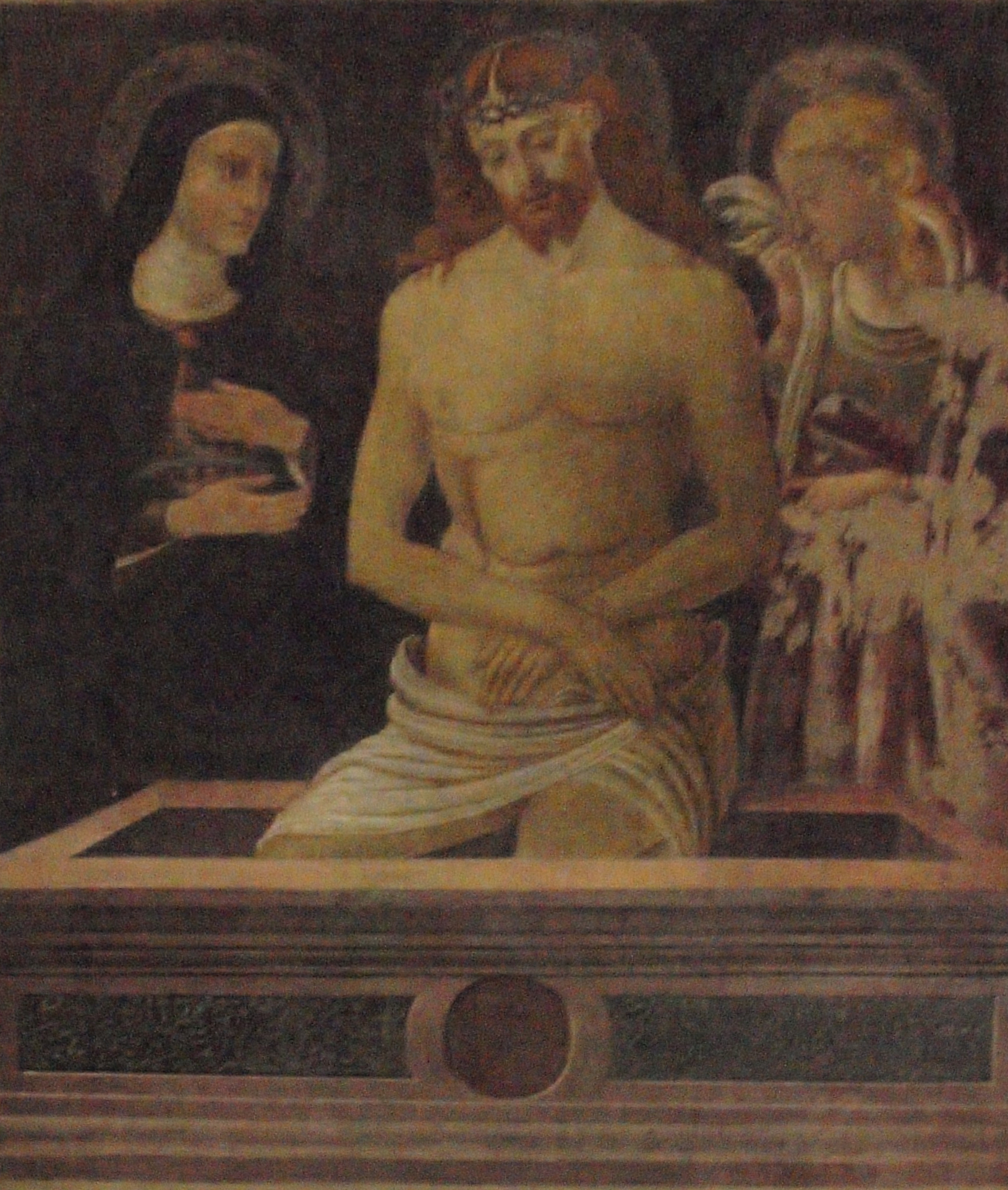 Pietà